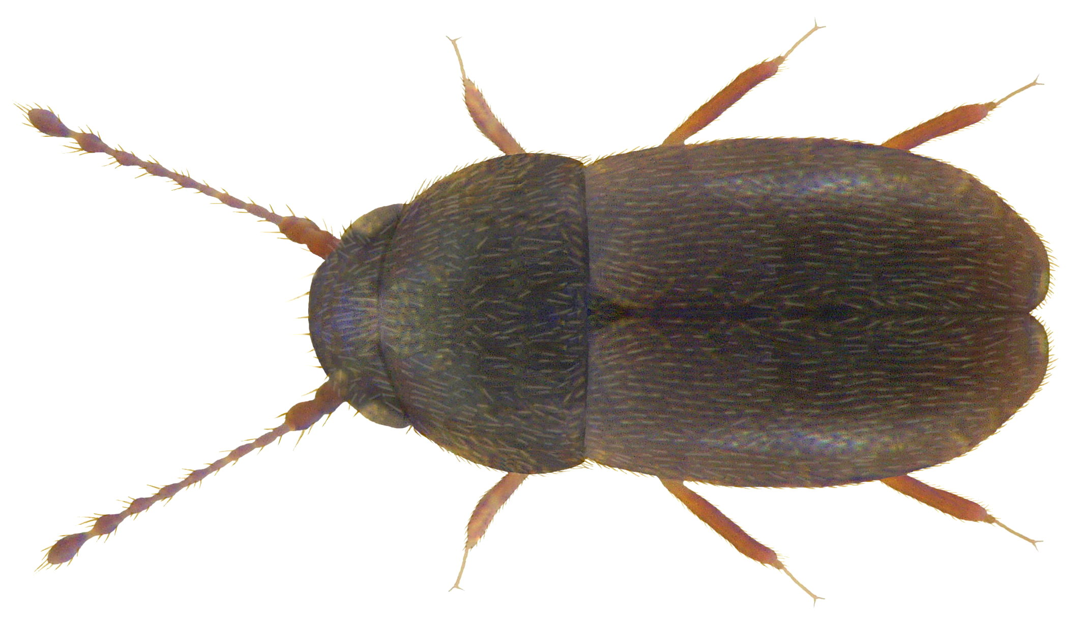 Familie: Ptiliidae Grösse: 0,75-0,85 mm Verbreitung: Mittel- und Nordeuropa Ökologie: in Fallaub, Vogelexkrementen, alten Kadavern Fundort: England Photo: U.Schmidt, 2009